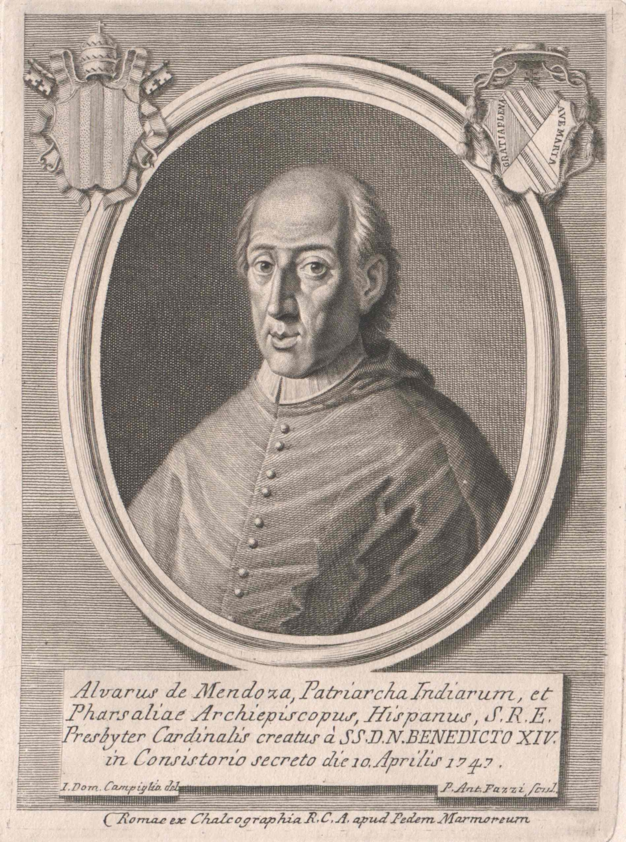 Retrato de Álvaro de Mendoza (1671-1761)